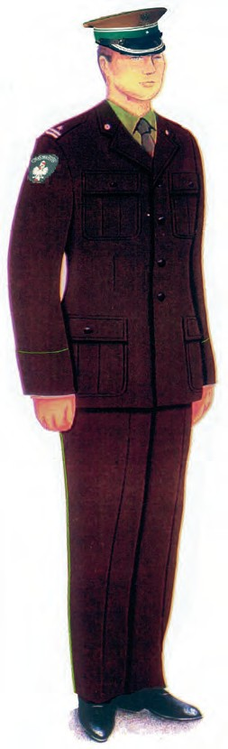 Ubiór wyjściowy funkcjonariuszy noszących umundurowanie WL z mundurem wyjściowym i z czapką garnizonową.